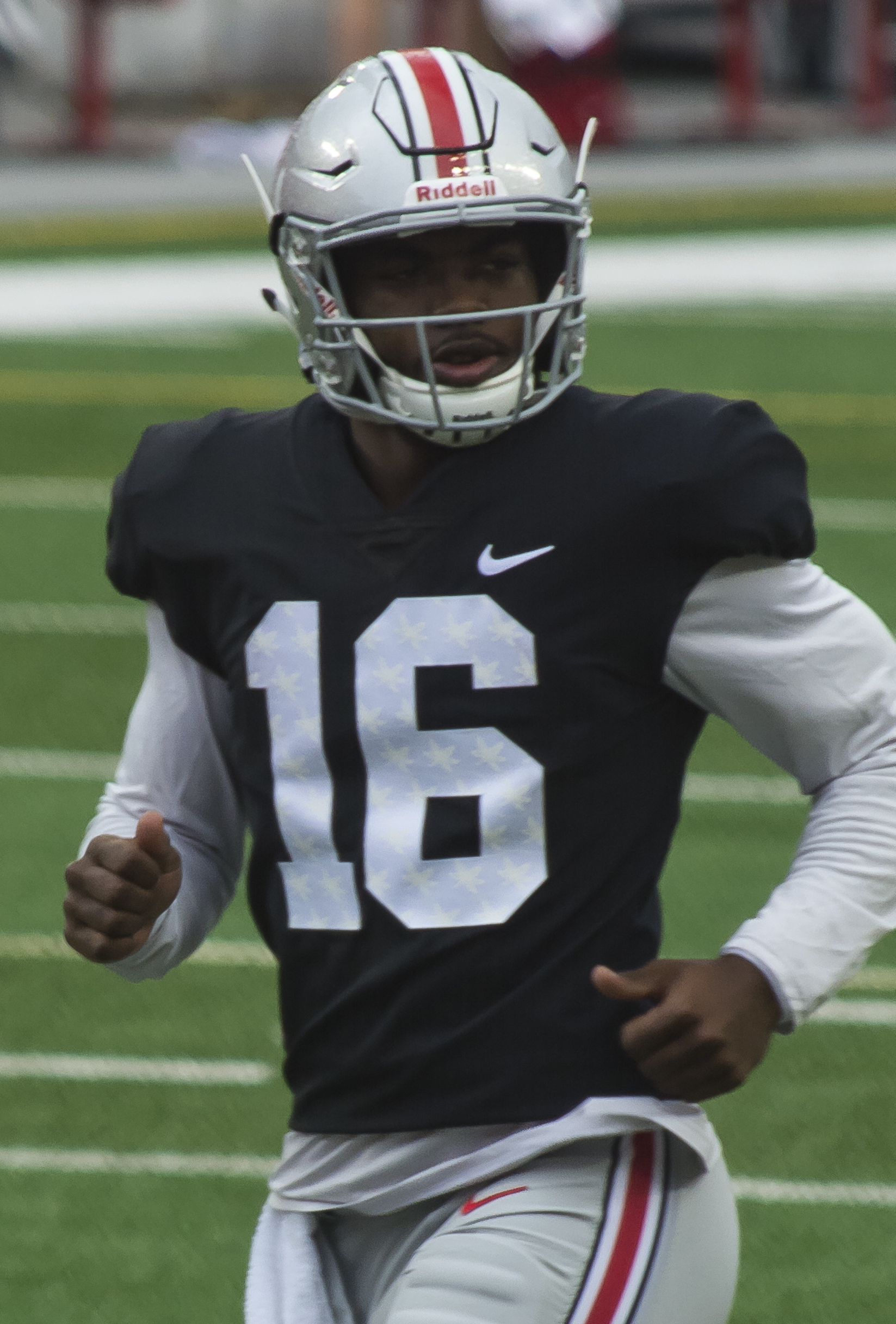 J. T. Barrett in 2017